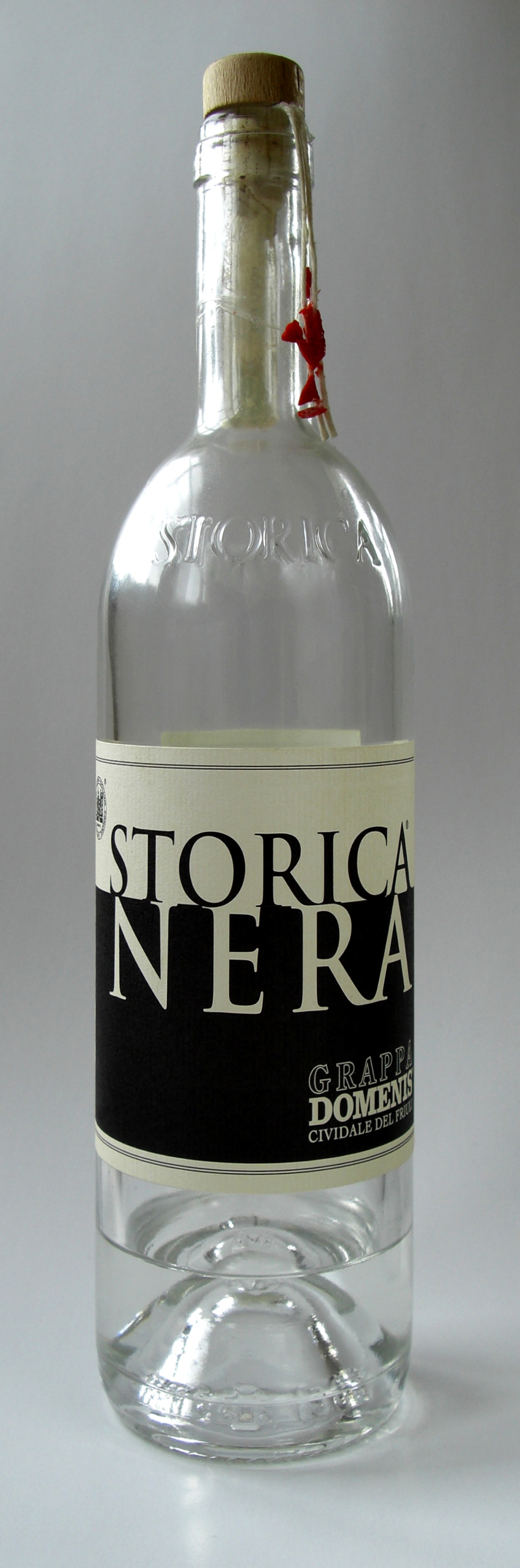 See title